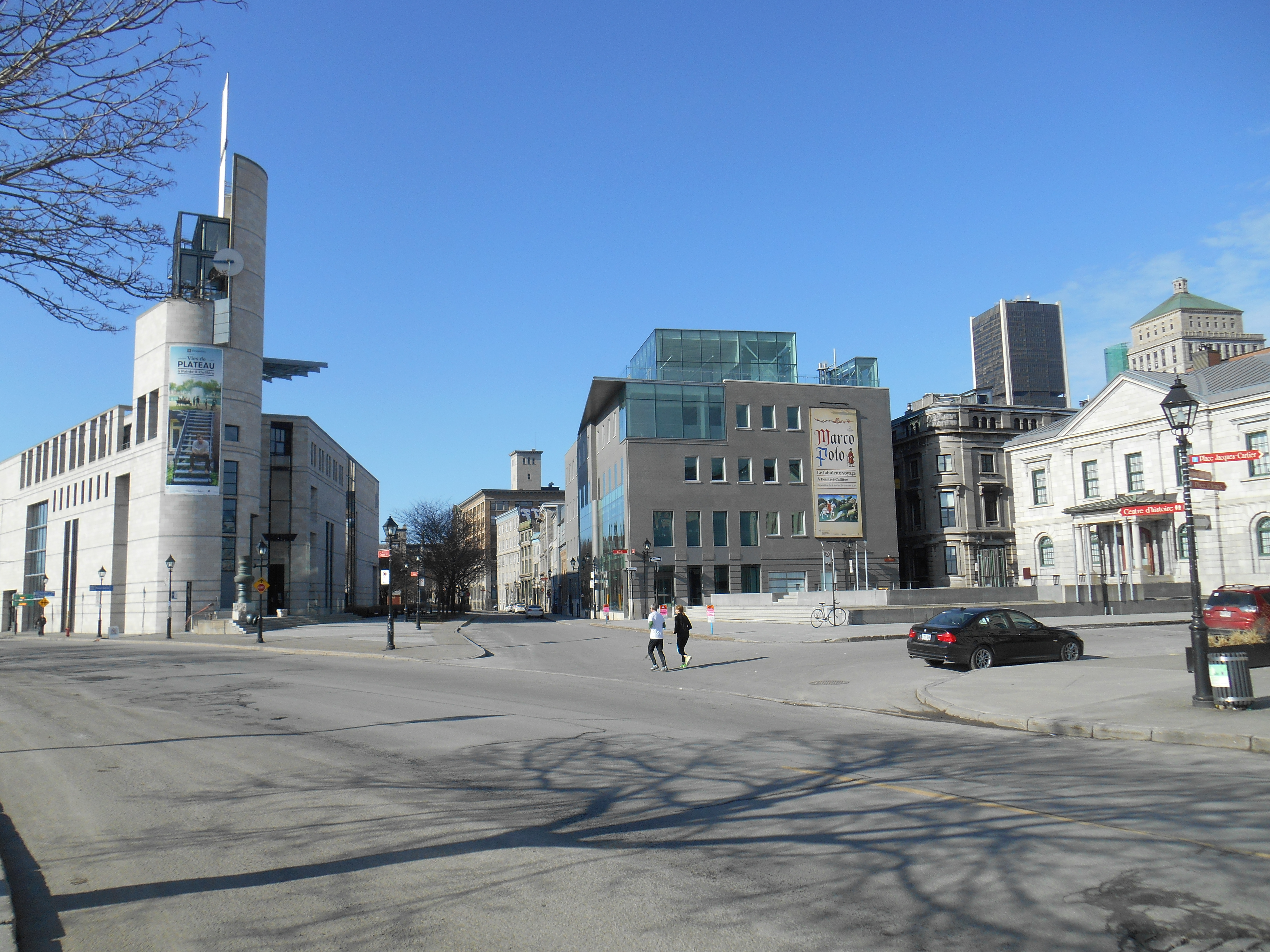 Pointe-à-Callière, musée d'archéologie et d'histoire de Montréal À gauche : L'Éperon Au centre : La Maison-des-Marins, 165-169 Place d'Youville À droite : l'Ancienne-Douane